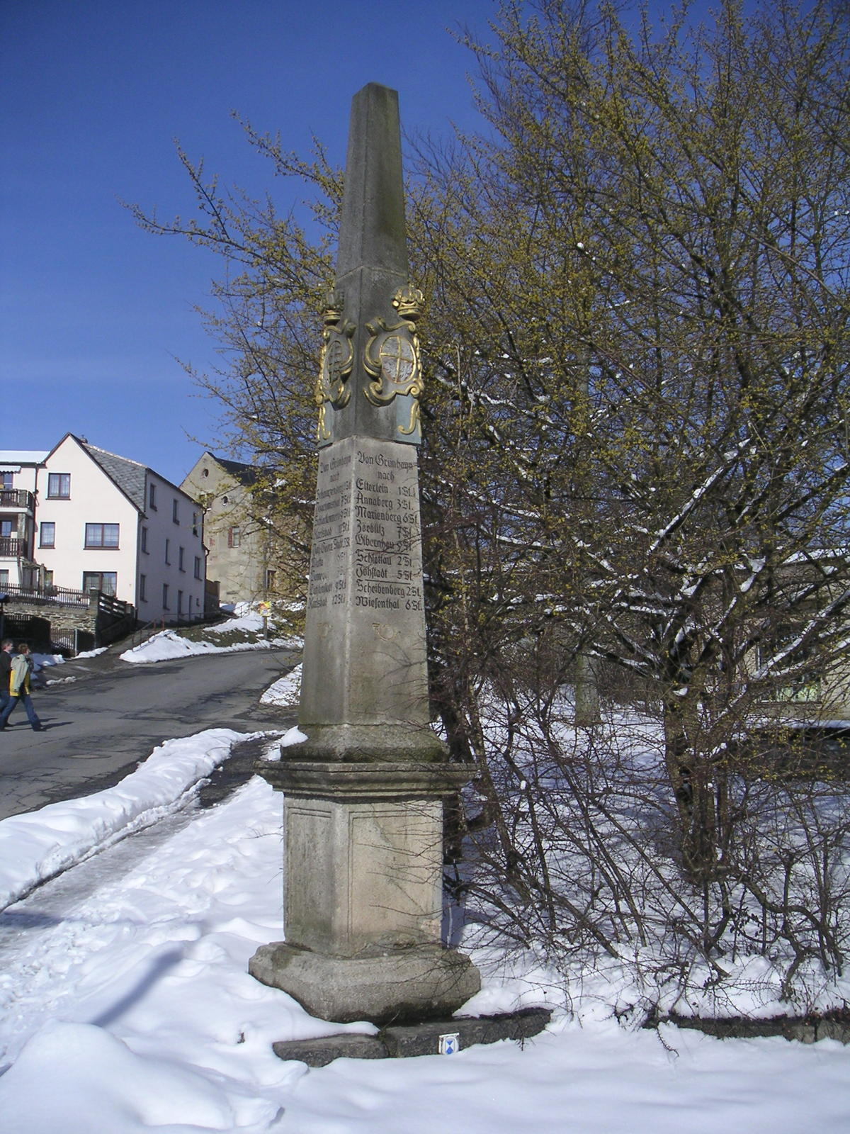 Distanzsäule in Grünhain vor dem Eingang zum ehemaligen Kloster